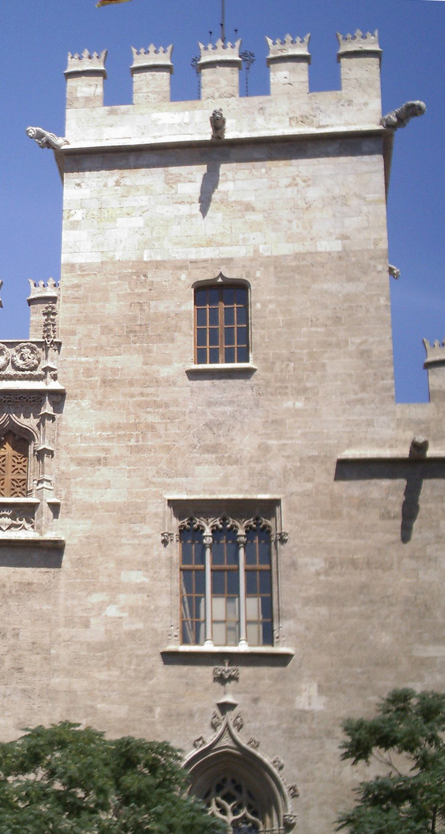 Medallons del Consolat del Mar (Llotja de la Seda),València.